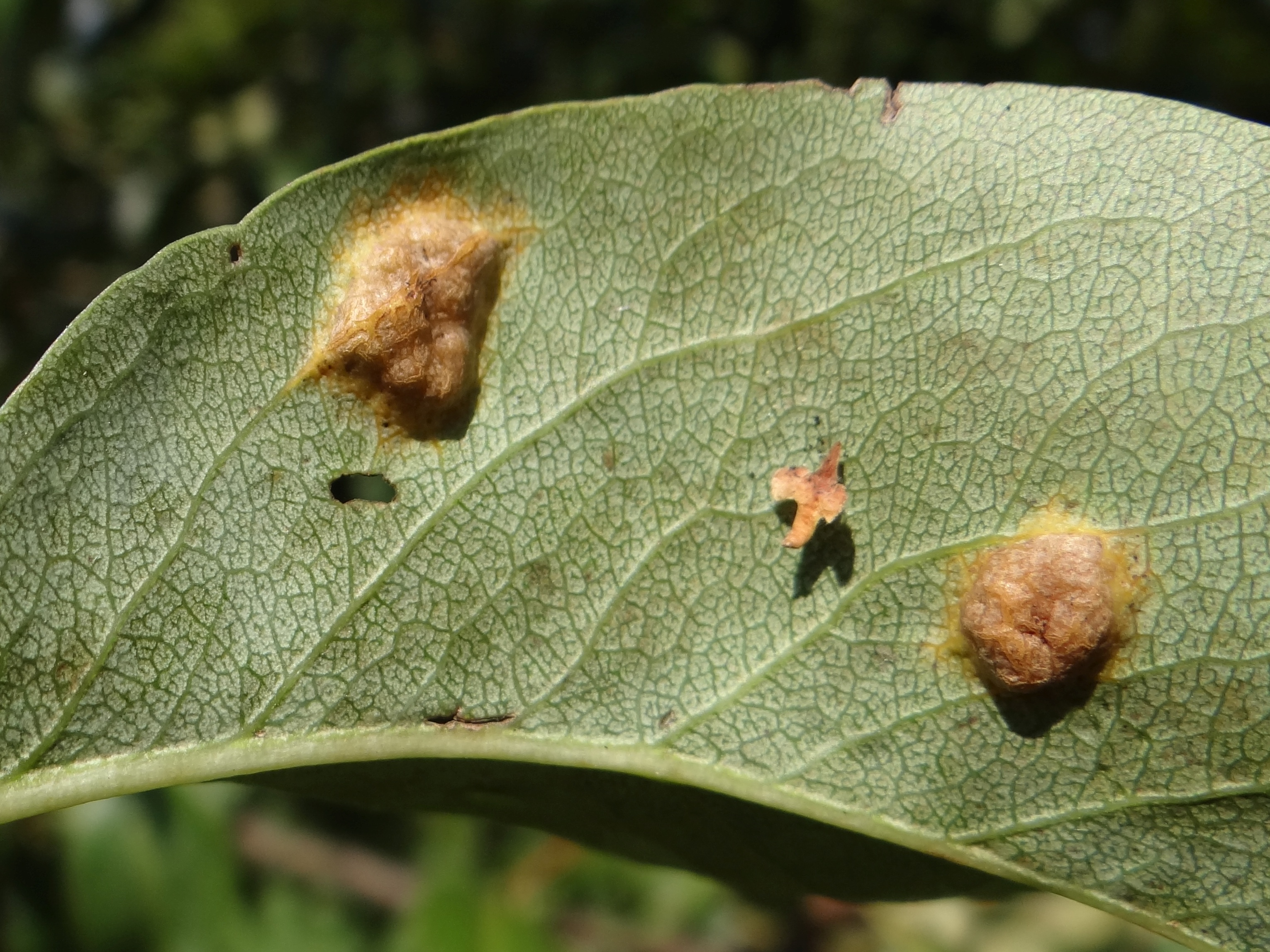 Gymnosporangium sabinae on Pyrus